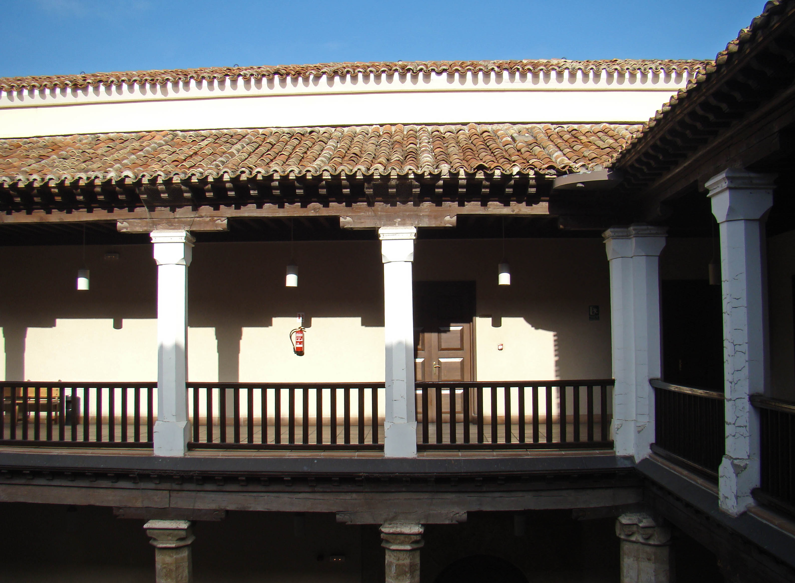 El palacio de los Vivero fue construido a mediados del siglo XV para don Alonso Pérez de Vivero, Contador Mayor de Juan II. En una de sus estancias, la llamada Sala Rica, firmaron compromiso de matrimonio el 14 de octubre de 1469 los Reyes Católicos, uniéndose así las Coronas de Castilla y Aragón. En el siglo XXI alberga el Archivo Histórico Provincial de Valladolid. En la foto se ve parte del segundo piso del patio.